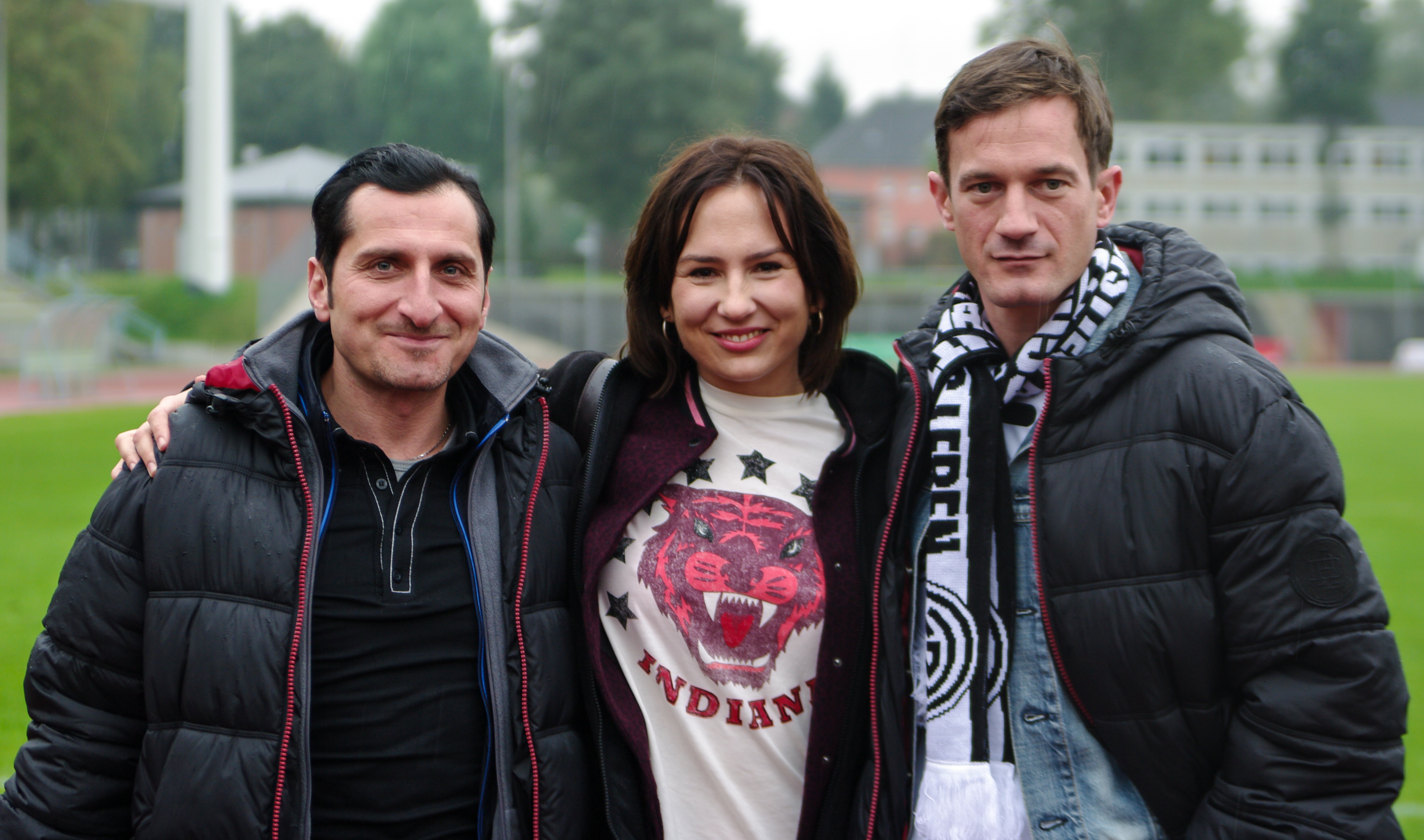 Set-Pressetermin ARD „Heiter bis tödlich - Koslowski & Haferkamp" im Stadion von Wattenscheid 09 am 11. Oktober 2013 Tim Seyfi Anna Grisebach Sönke Möhring